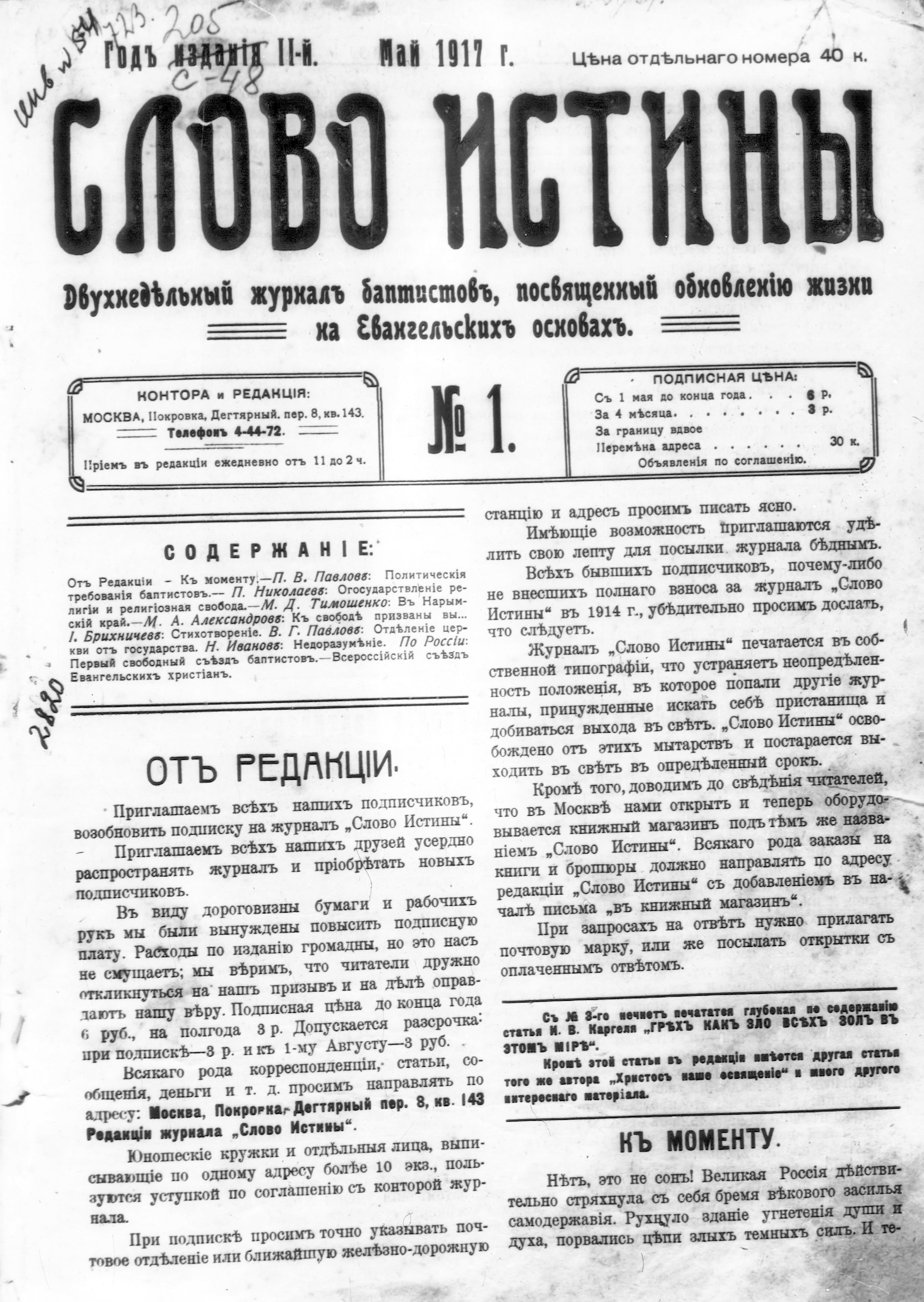 Первая страница русского баптистского журнала "Слово Истины" №1, 1917